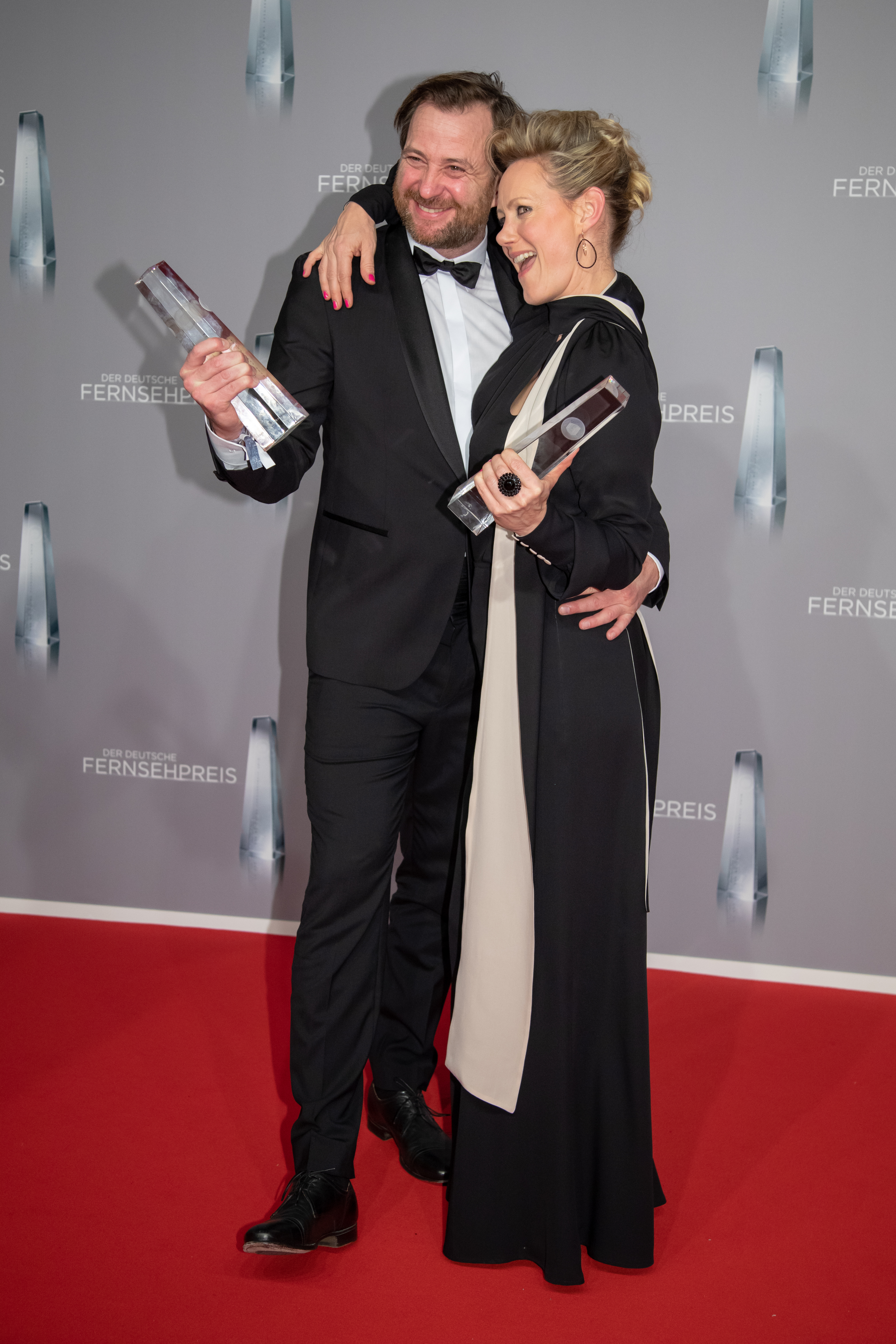 Anna Schudt; Christian Erdmann beim Deutschen Fernsehpreis 2019 in der Düsseldorfer Rheinterrasse